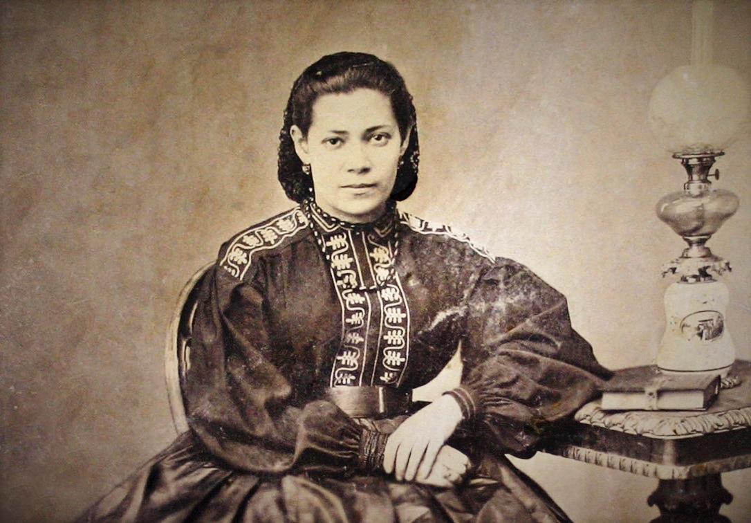 Ol'ga Sokratovna Vasil'eva (1833-1918), la moglie di Nikolaj Černyševskij